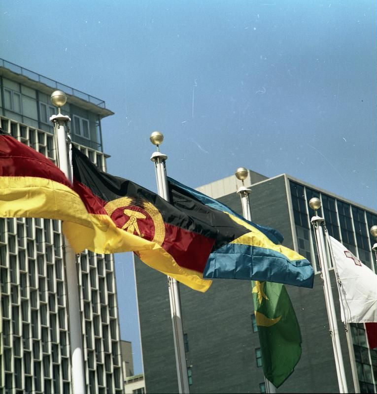 New York, Fahnen vor dem UNO-Gebäude ADN-ZB-Spremberg, 25.9.1973 New York: DDR in die UNO aufgenommen; die erste Woche der XXVIII. Tagung der UNO-Vollversammlung in New York stand ganz im Zeichen der Aufnahme der Deutschen Demokratischen Republik und anderer neuer Mitglieder in die Weltorganisation. Am 18. September 1973, dem Tag der Eröffnung der Vollversammlung, nahm die DDR auf einstimmigen Beschluß des Weltforums ihren legitimen Platz in den Vereinten Nationen ein. UBz.: Auf dem Gelände des UNO-Hauptquartiers weht die Fahne der Deutschen Demokratischen Republik. In einer feierlichen Zeremonie war sie am 19.September 1973 von Mitgliedern der UNO-Fahnewache in Anwesenheit des UNO-Genralsekretärs Kurt Waldheim und der Mitglieder der DDR-Regierungsdeledation sowie zahlreicher anderer Staatenvertreter gehißt worden. [Die Fahnen der BRD und der DDR wehen auf dem UNO-Gelände.]